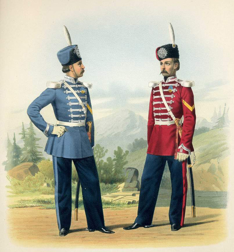 Унтер-Офицеры Л.-Гв. Атаманского Е. И. В. Наследника Цесаревича полка и Л.-Гв. Уральского Казачьего дивизиона. 10 июля 1867. (В городской праздничной форме).